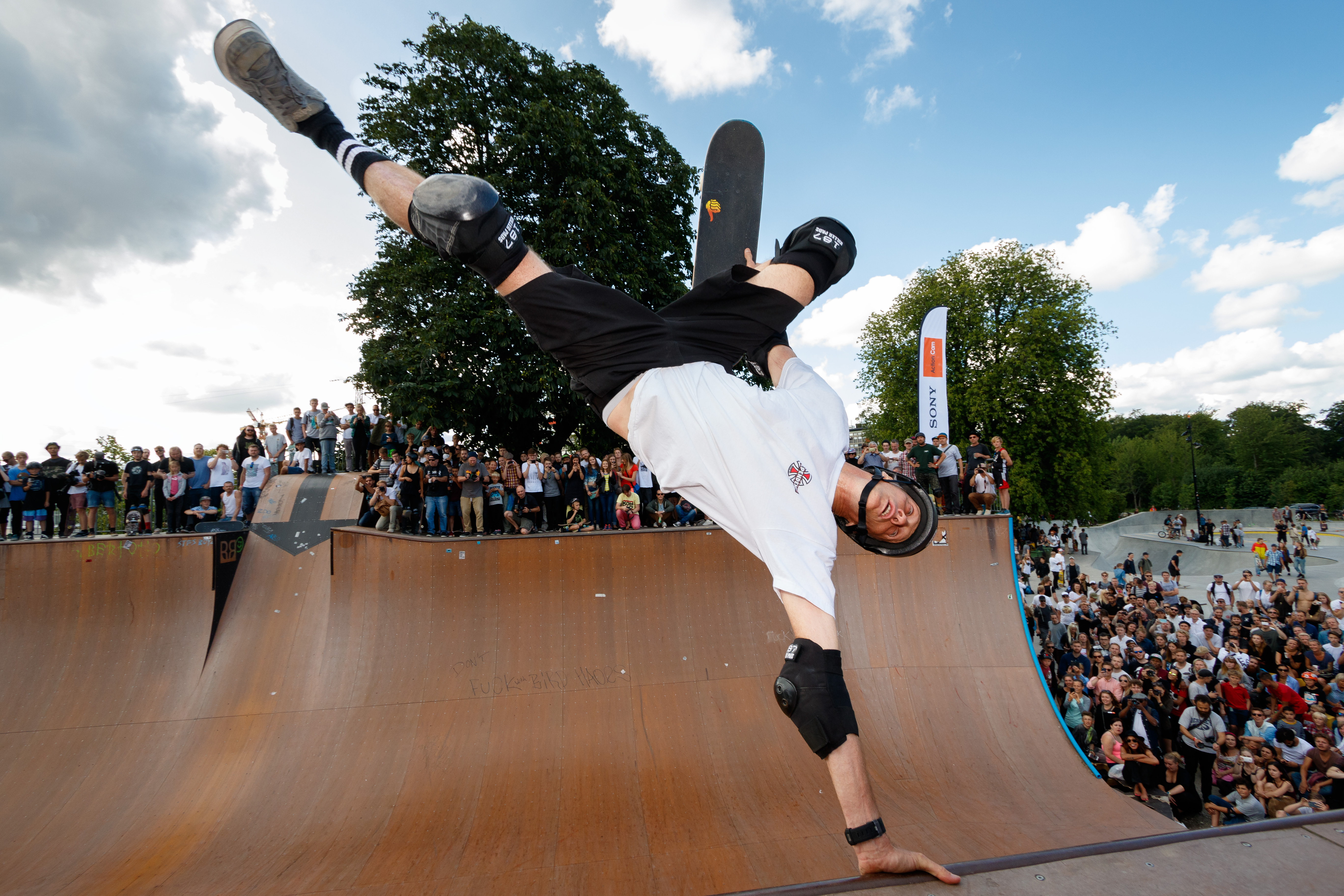 Tony Hawk in Fælledparken Skatepark, Copenhagen, Denmark, 2015.